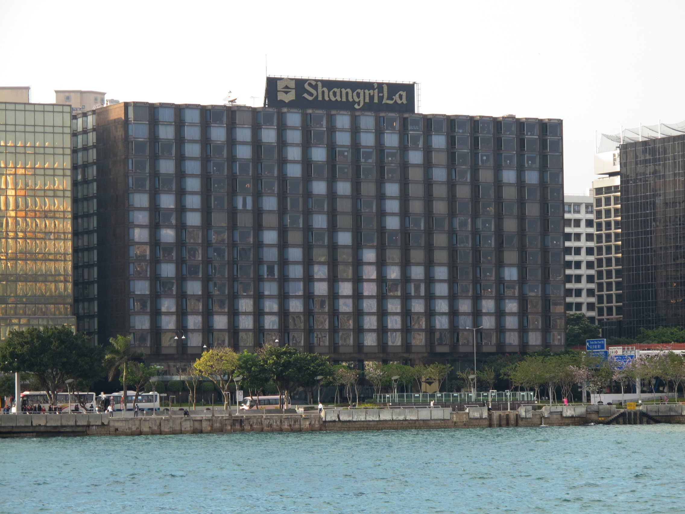 Kowloon Shangri-La